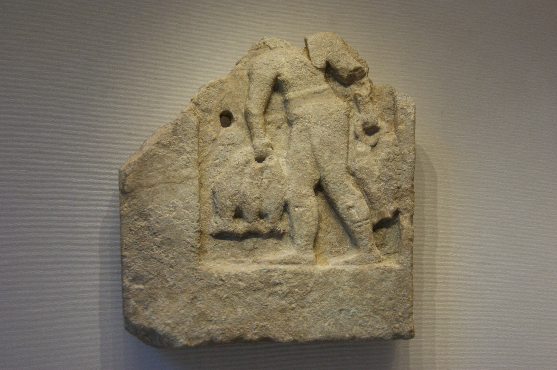 Selon le cartel du Musée du Louvre, il s'agit d'un bas-relief fragmentaire, en albâtre, daté de la dynastie archaïque III, vers 2500 avant JC., provenant des fouilles Cros, en 1903, à Tello (ancienne Girsu). Numéro inventaire du Musée du Louvre : AO 4110 Vitrine "Epoque des dynasties archaïques de Sumer, vers 2900-2340 av. JC, antiquités de Tello, ancienne Girsu", département des antiquités orientales, Salle A, Mésopotamie, aile Sully, niveau RDC.